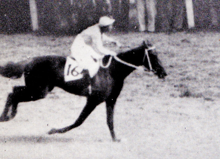 1951年東京優駿、イッセイ